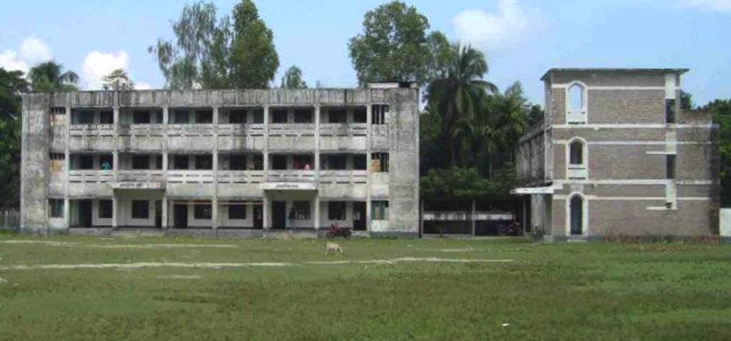 উলিপুর মহারাণী স্বর্ণময়ী উচ্চবিদ্যালয় ও কলেজের নতুন একাডেমিক ভবন।